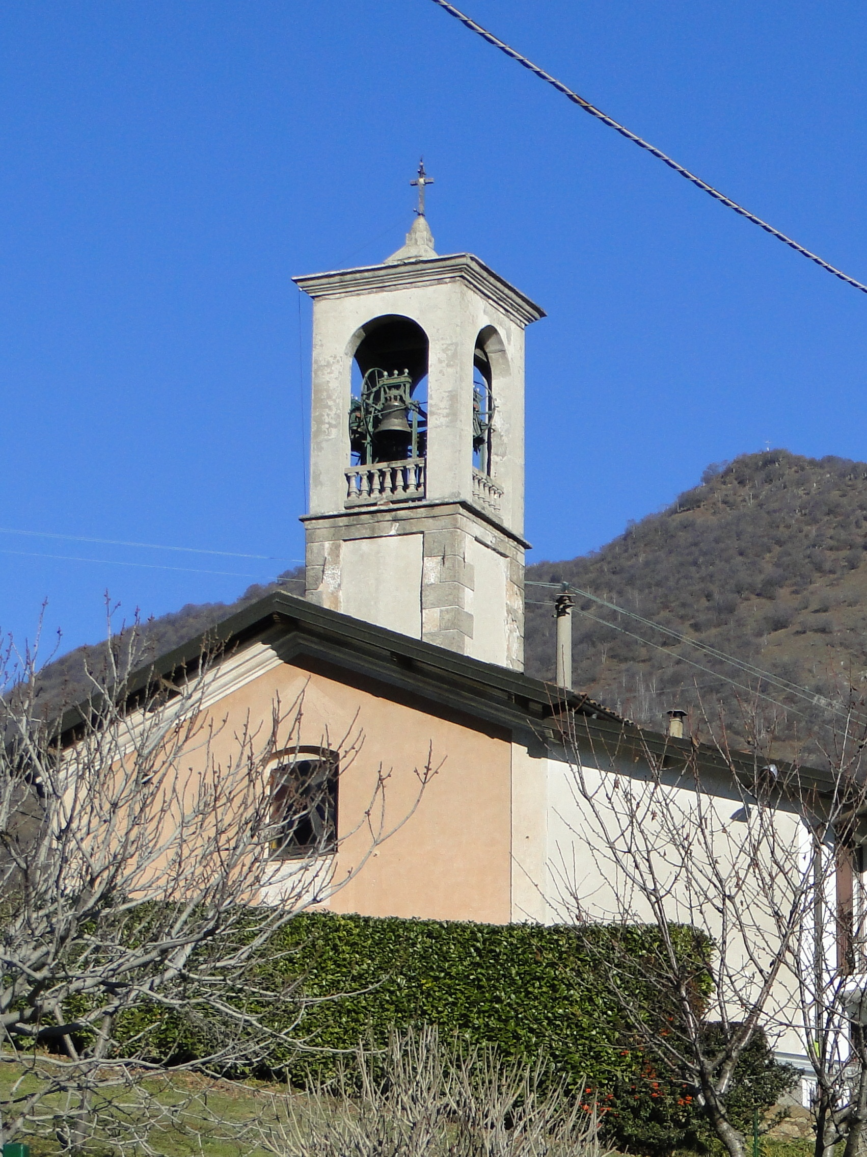 Burro, fraz. di Alzano Lombardo (BG), Italy. Chiesa San Bernardo